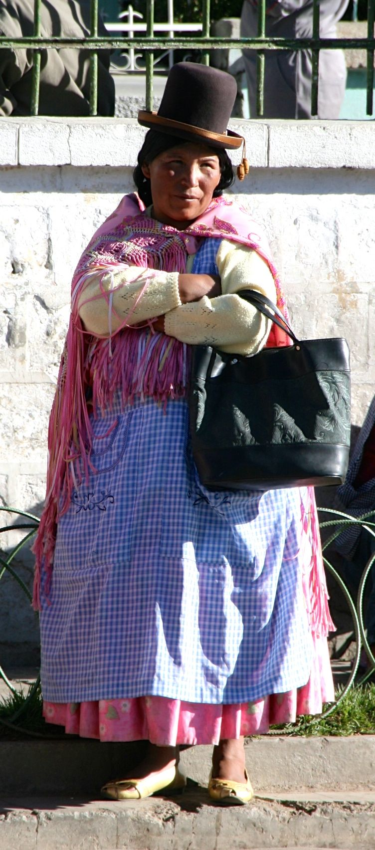 Frau in traditioneller indigener Gewandung, aufgenommen in La Paz, Bolivien.